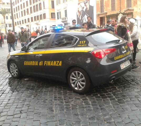 Vehiculo de la Guardia di Finanza italiana